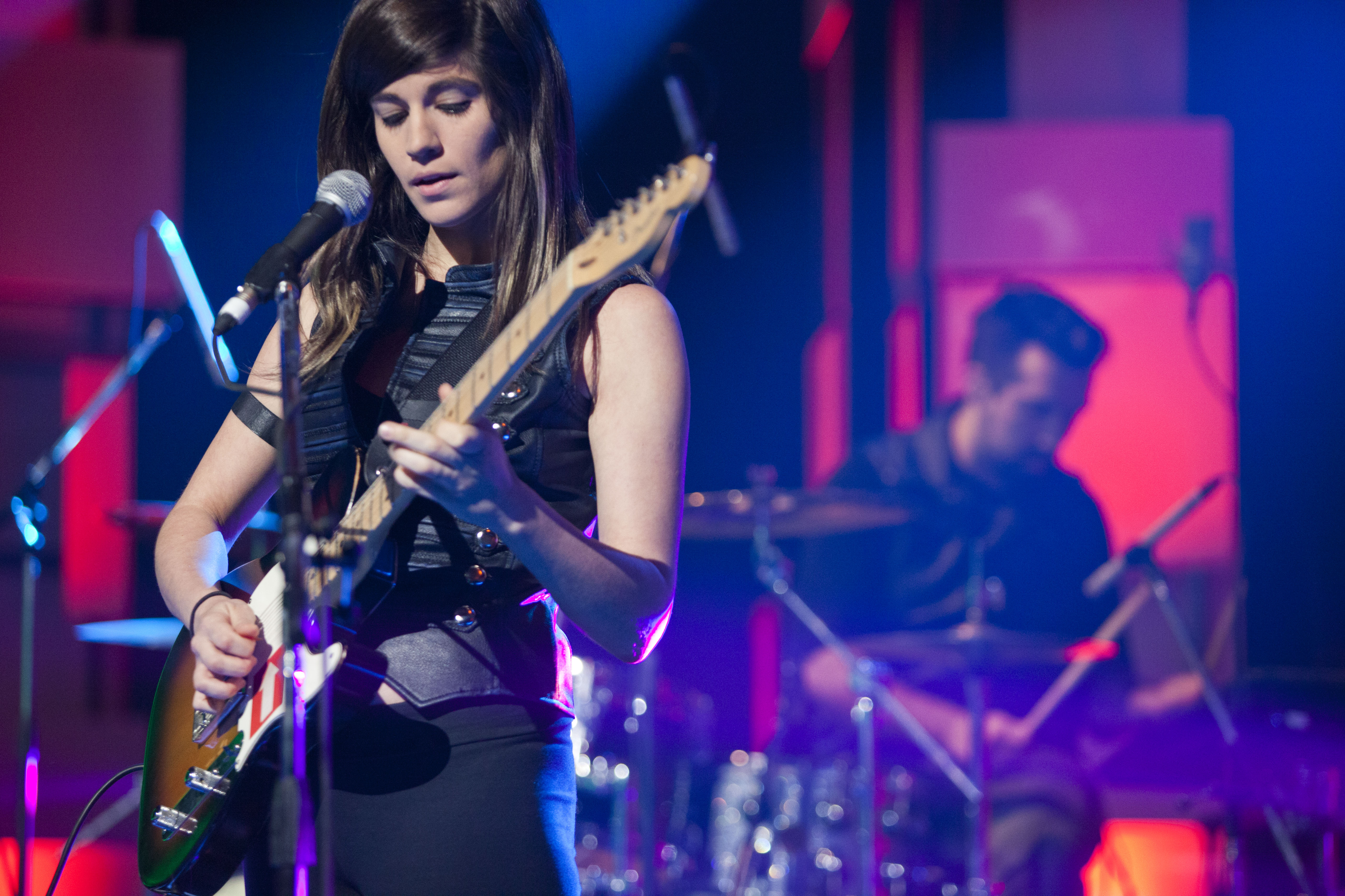 Lula Bertoldi, cantante y guitarrista de Eruca Sativa.